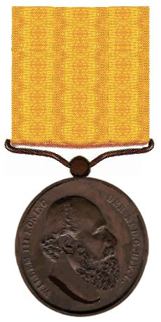 Watersnoodmedaille